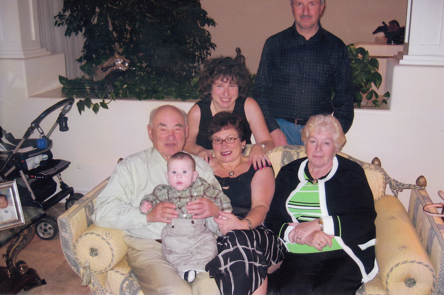 Меер Дейч в гостях у дочери и внучки в США.